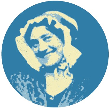 Médaillon issu d'une photographie datant de 1939, retravaillée pour les journées Alice POULLEAU NOLAY FRANCE BOURGOGNE COTE D'OR.